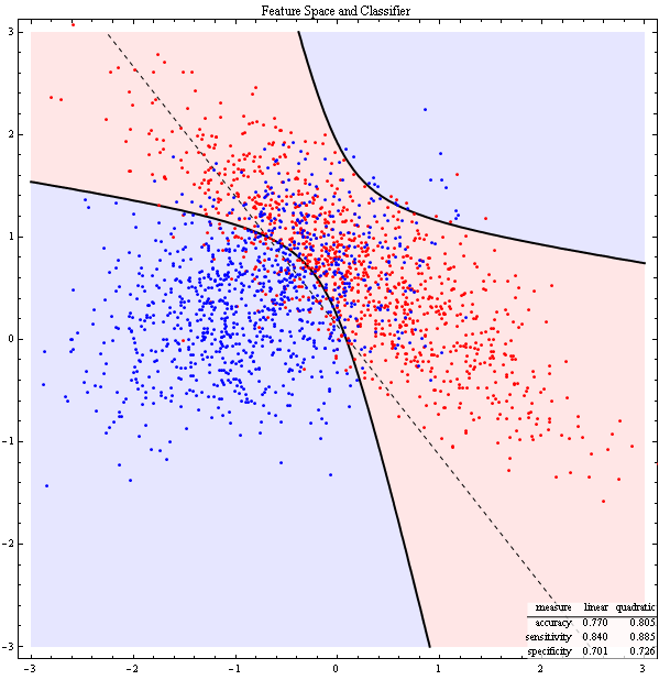 Obrázek ukazuje pozorování znaků na objektech ze dvou tříd (pozorování z jedné třídy modře, z druhé červeně) a prediktor získaný kvadratickou diskriminační analýzou pro klasifikaci dalších pozorování na základě hodnot znaku (červená a modrá oblast). Přerušovaná přímka znázorňuje hranice oblastí prediktoru získaného aplikací lineární diskriminační analýzy. Jde o printscreen výstupu kódu staženého z (licence MIT).